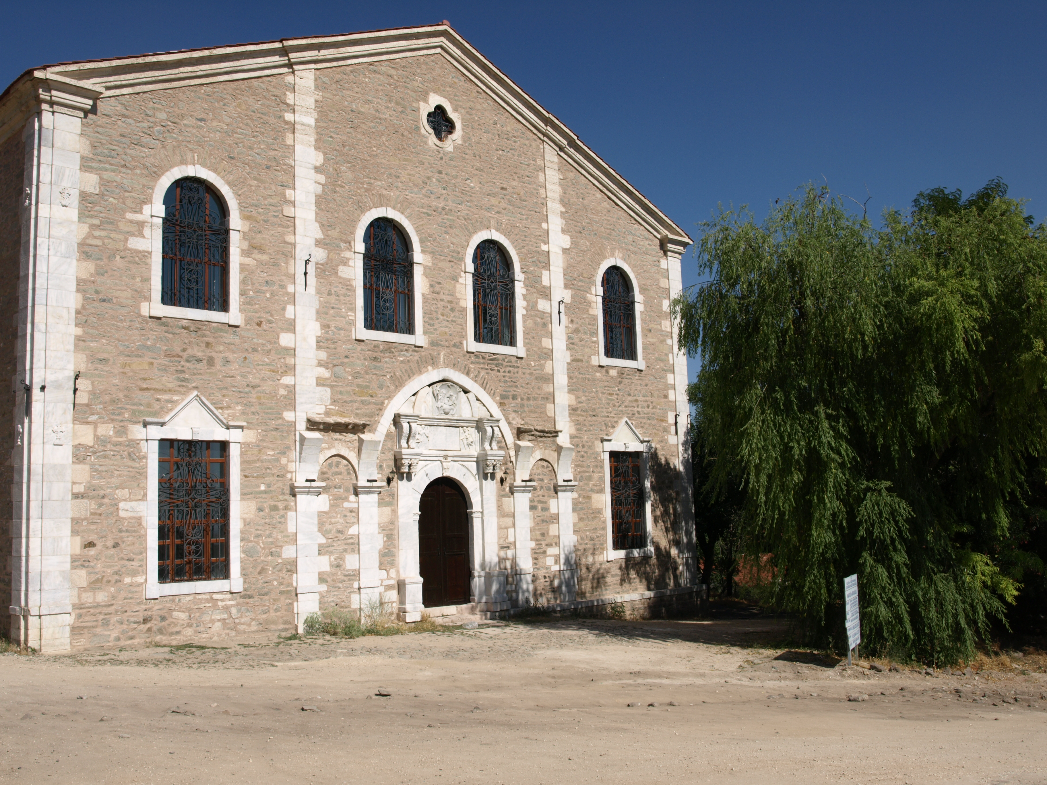 Frontansicht der ehemaligen armenischen Kirche von Sivrihisar